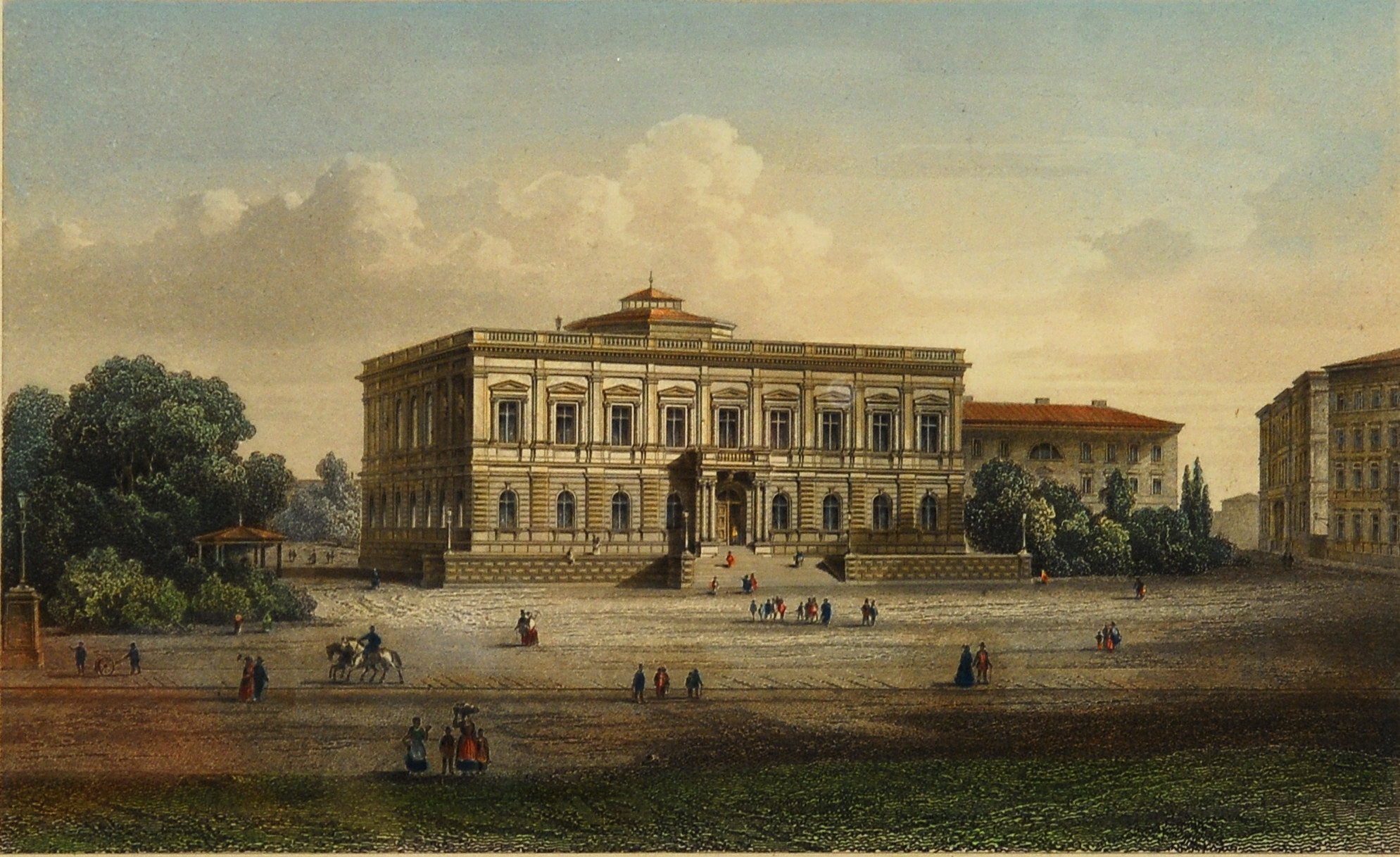 Das neue Museum in Leipzig. Kolorierter Stahlstich von J.[oseph] M.[aximilian] Kolb 10,7 x 17,4 cm um 1860 nach einer Zeichnung von L. Lange